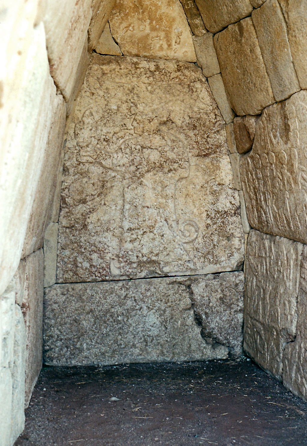 Hieroglyphenkammer in der Südburg, Relief des Sonnengottes, Ḫattuša, Zentraltürkei